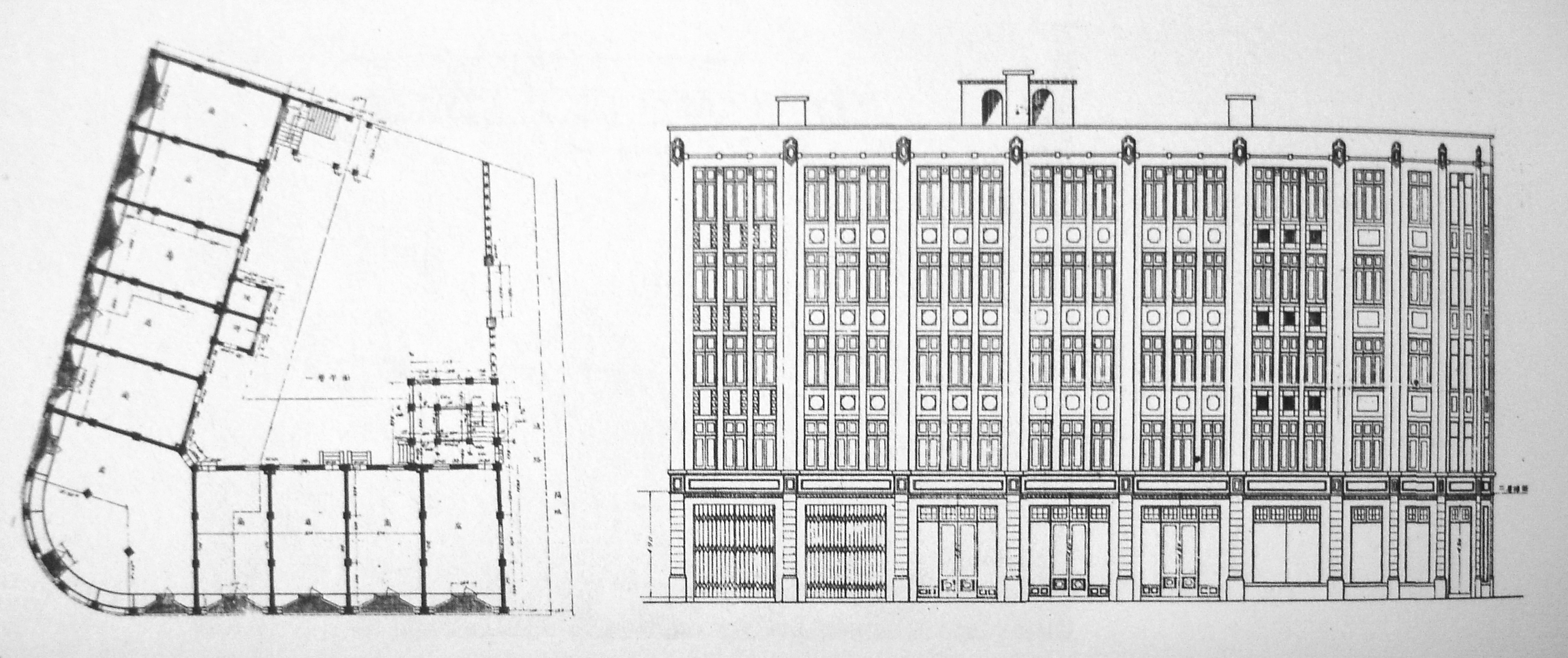 青岛洪泰商场设计图